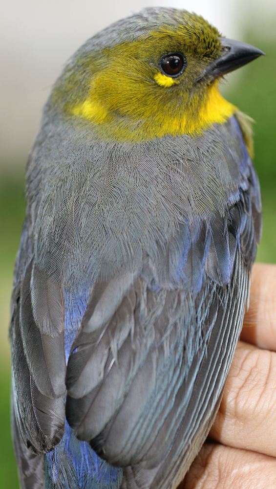 Anisognathus lacrymosus pallididorsalis Birds of Serranía de Perijá of Colombia and Venezuela (Ornitologia Colombiana [2014] 14: 62–93)